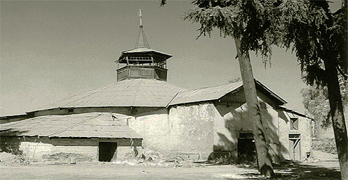 La bodega del “Castellón” de San Carlos de Puente Alto